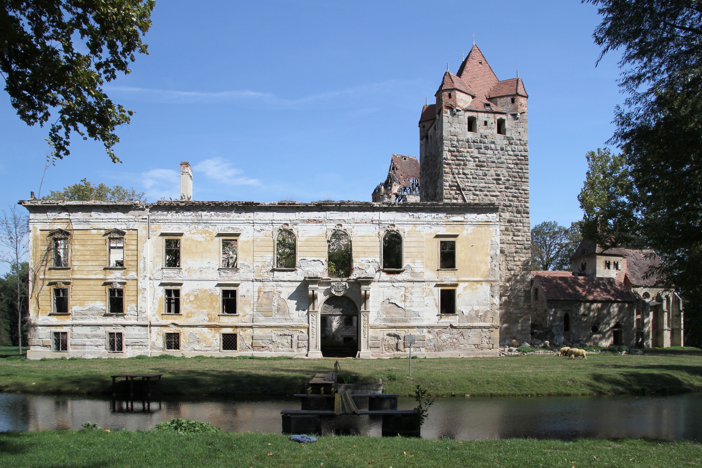 Die Südansicht des Pottendorfer Schlosses.